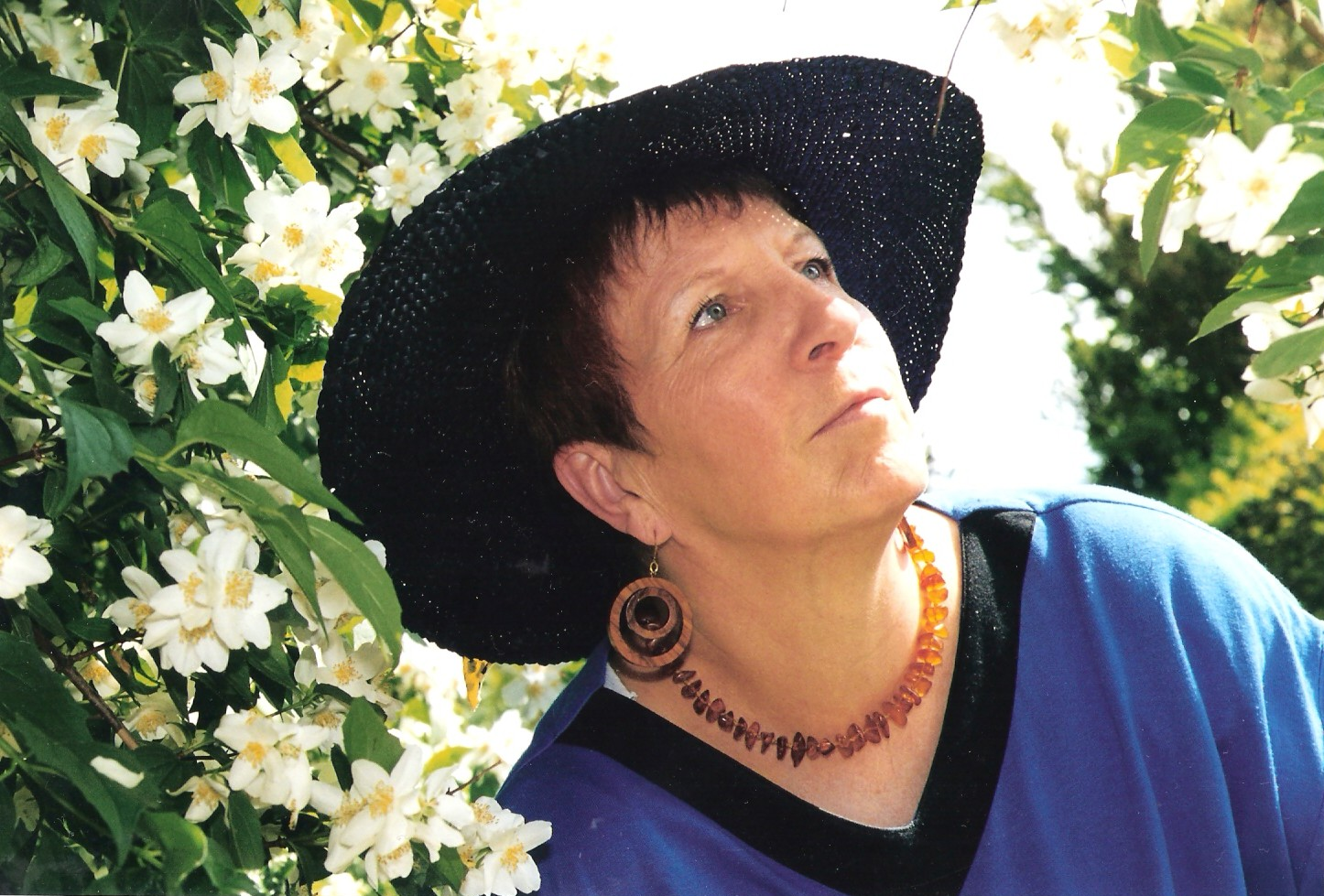 Portrait Dagmar Scherf 2007